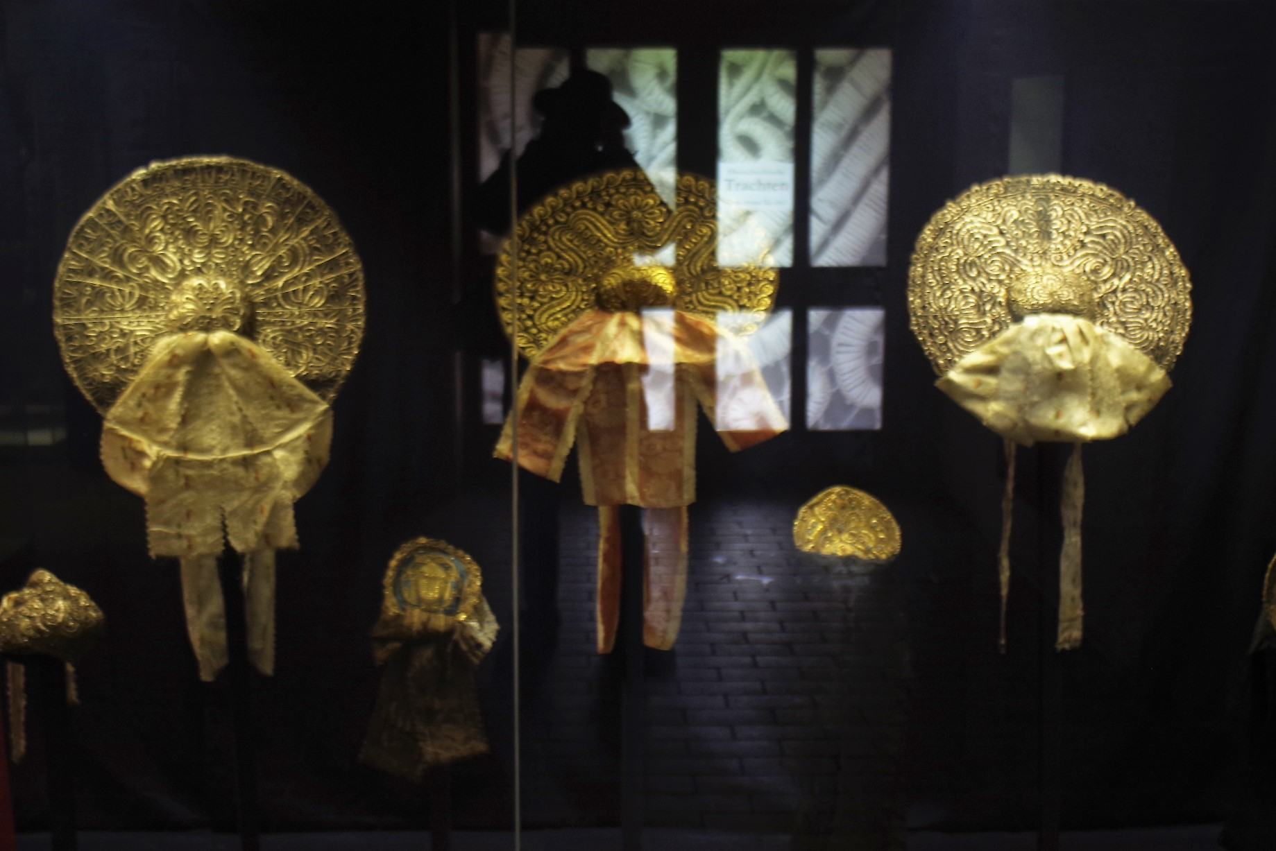 Goldgestickte Radhauben für Festage im Oberschwäbischen Museumsdorf Kürnbach